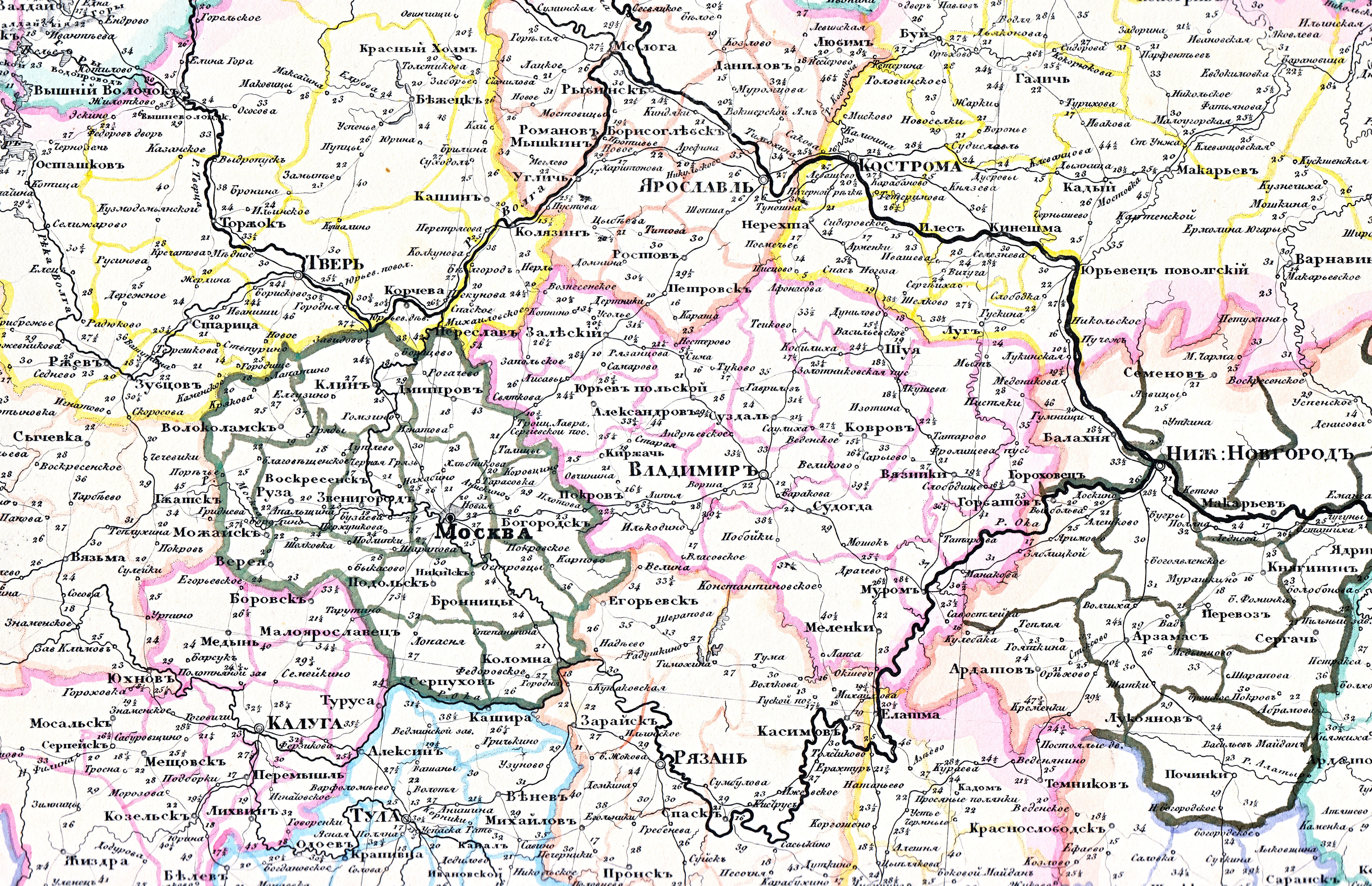 Новая географическая дорожная карта Российской империи с означением 57 губерний, 8 областей, 4 градоначальств, 4 управлений, 8 воеводств, Земли Большой и Малой Кабарды и Киргиз Кайсаков. С показанием учебных округов, городов, примечательных мест, водяных сообщений, почтовых проезжих дорог, и расстояние между оными в верстах. Составлена и издана служащим в Военно-типографическом депо капитаном Медниковым. 1833. С.-Петербург. Издание сей карты служит единственно руководством преподавающим и учащимся Российской географии по курсу Г.Г. Профессор. Арсеньева и Зяславского и для путешествующих по России.